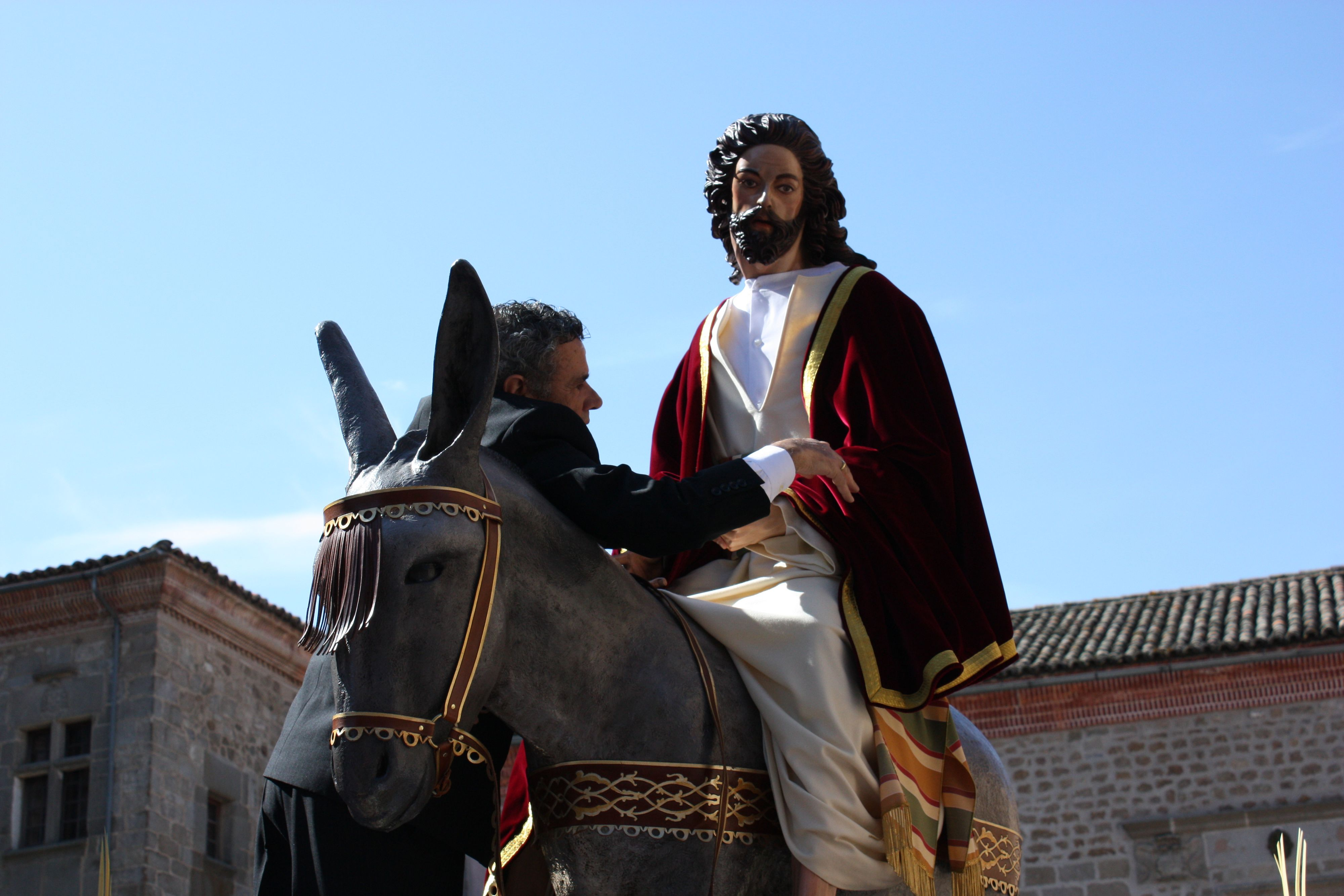 Procesión de la Hermandad de Nuestro Señor Jesucristo en su entrada triunfal en Jerusalén